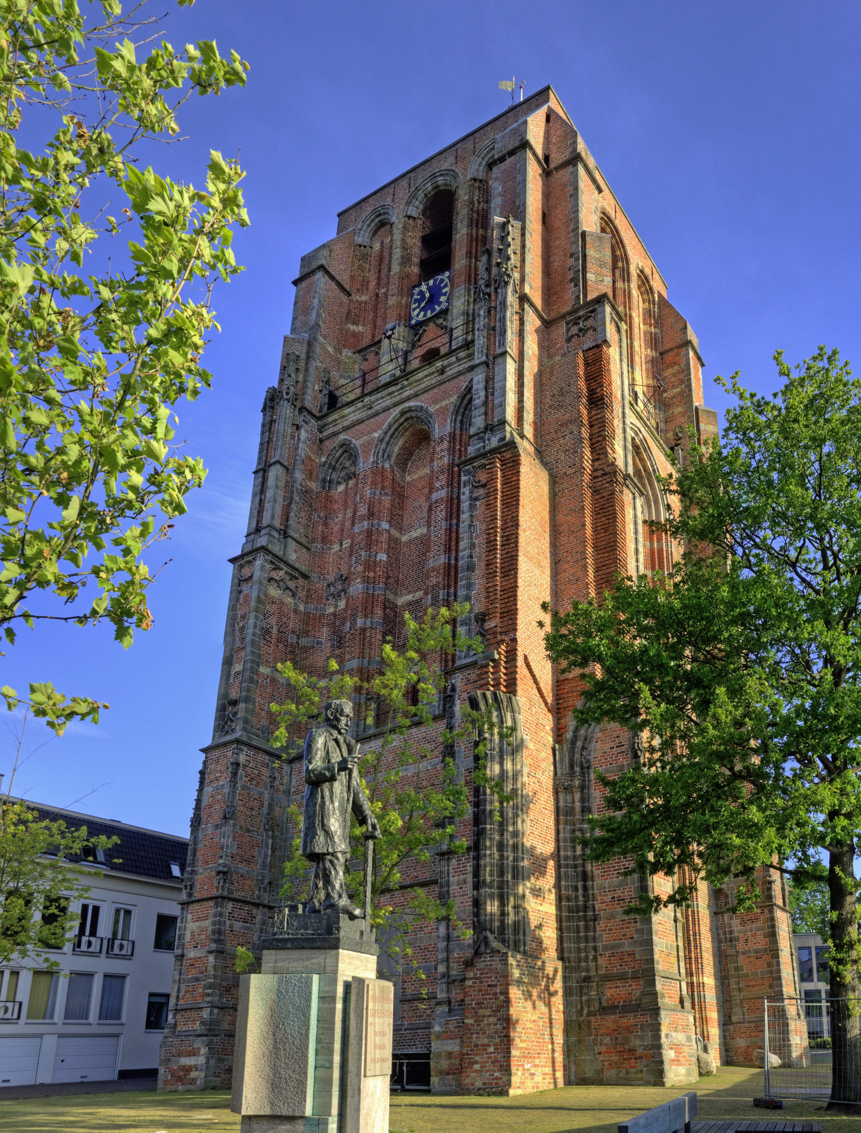 Toren Oldehove in Leeuwarden (Friesland, Nederland) met standbeeld Pieter Jelles Troelstra (1952) van Hildo Krop